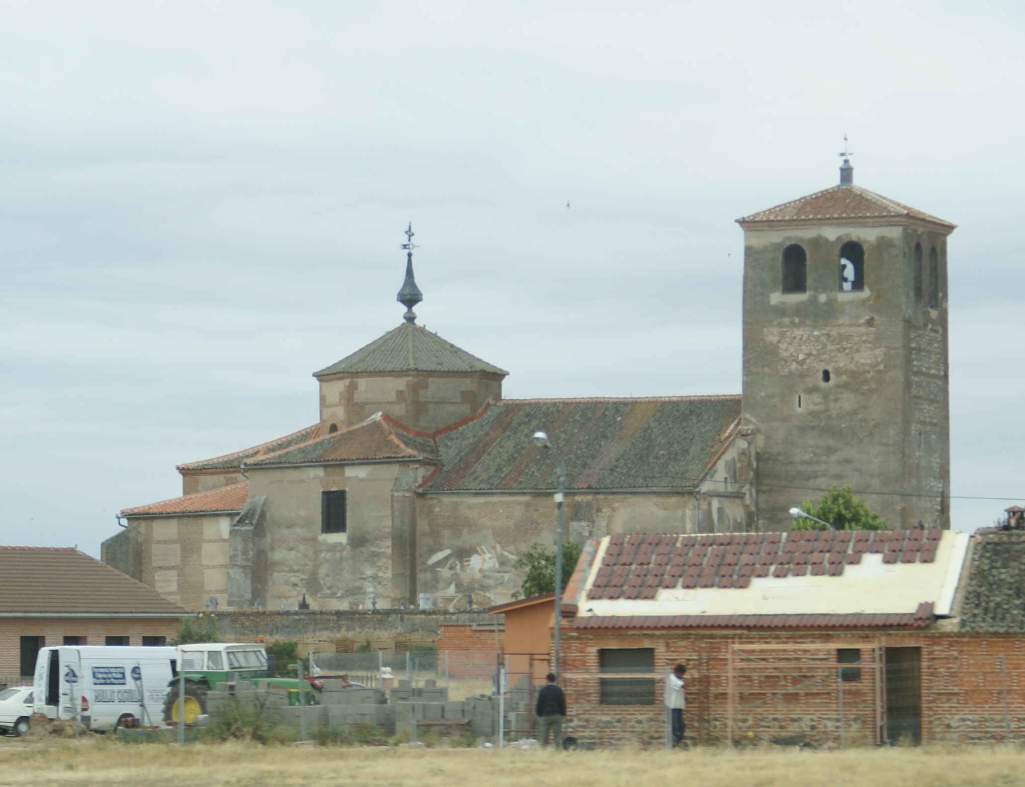 Iglesia de Santo Domingo de Silos de Codorniz, Segovia